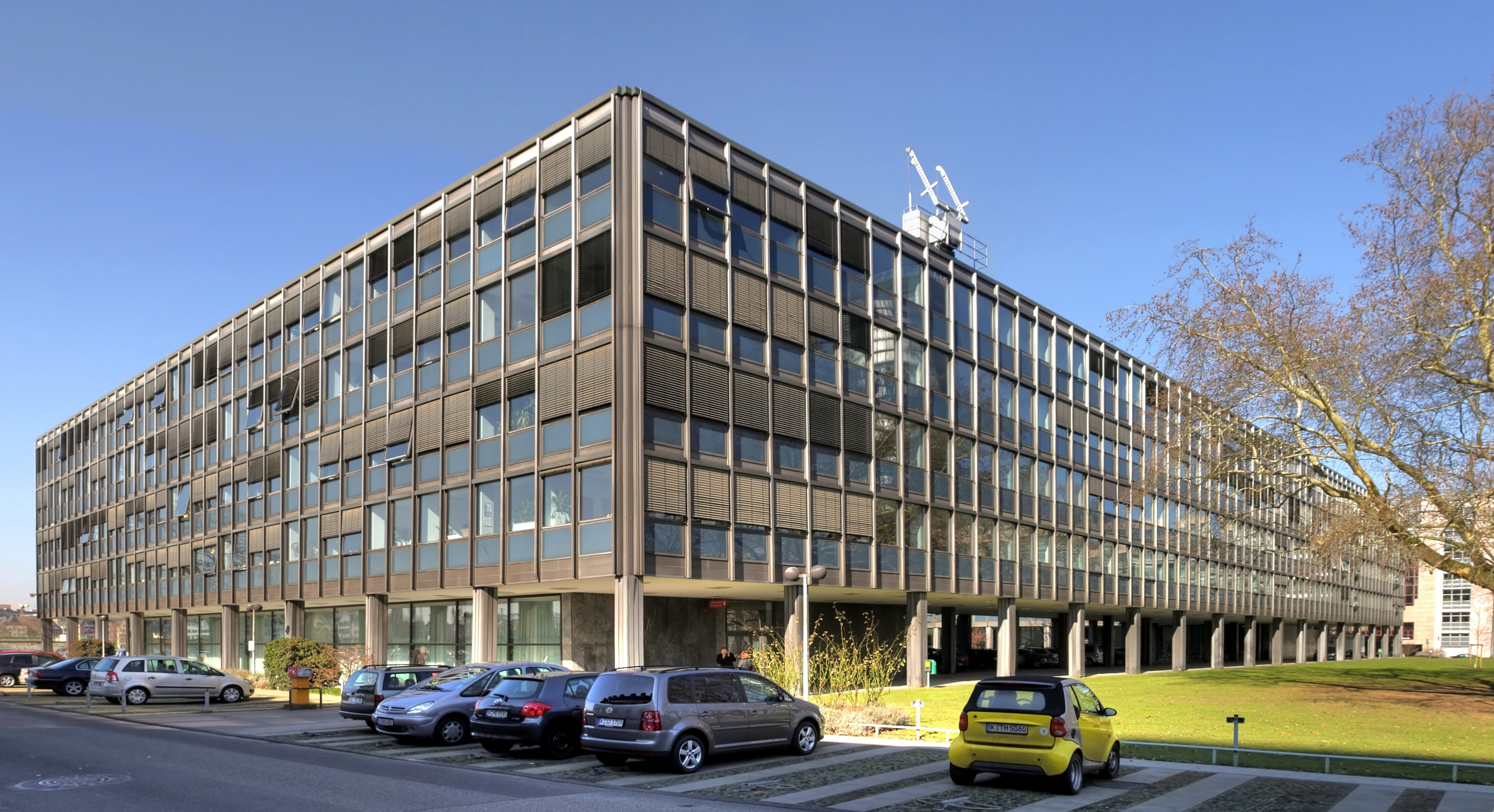 Landeshaus, Zentralverwaltung des Landschaftsverbandes Rheinland (LVR), Köln. Architekten: Eckhard Schulze-Fielitz, Ernst von Rudloff, Baujahr: 1959